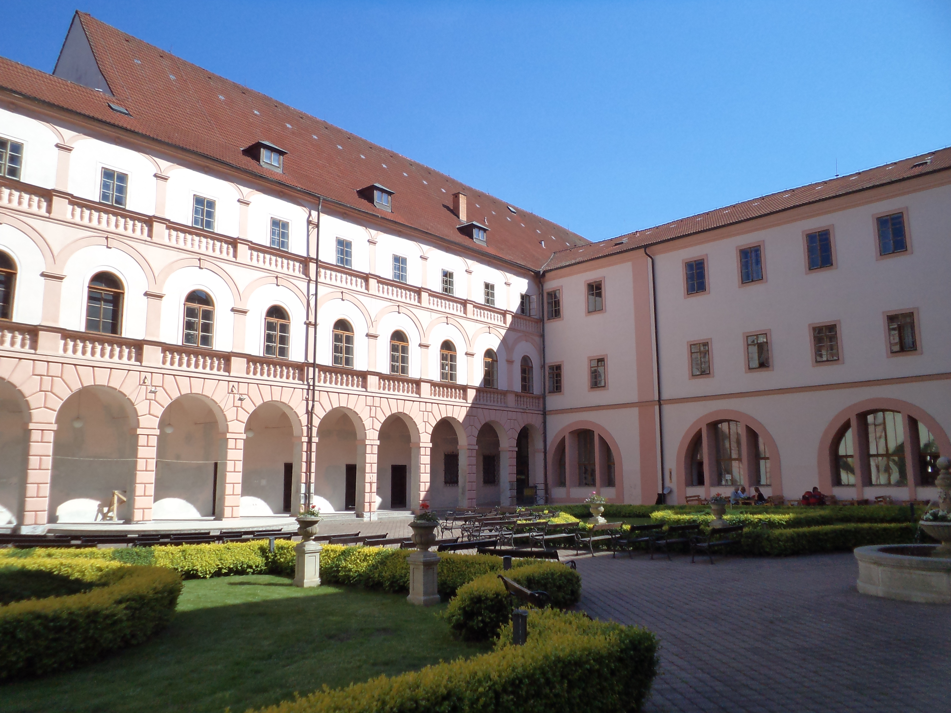 Chomutov - Nádvoří jezuitského areálu